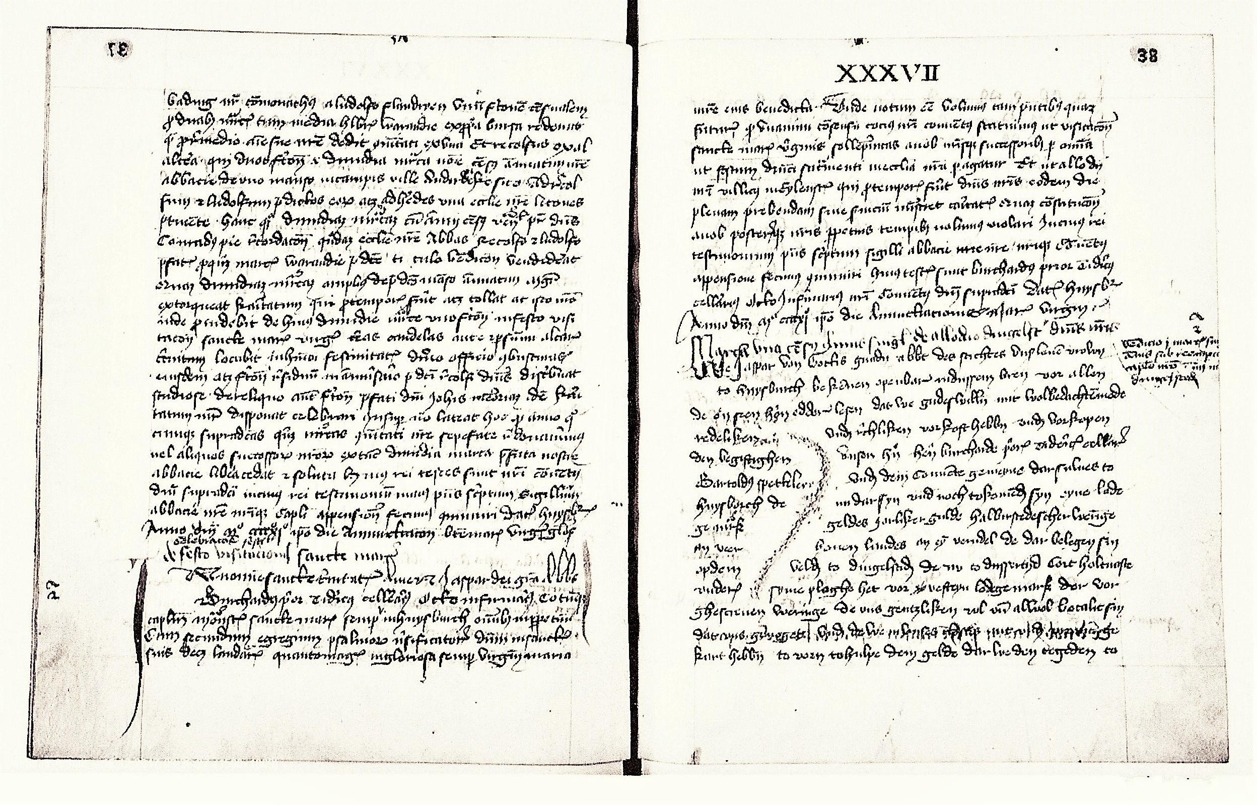 Kopialbuch „Copiarium monasterii Huysburg“, angelegt 1403 unter Abt Jasper Edler von Berwynkel mit Urkunden-Abschriften auf 93 Pergamentblätter. Laufzeit 1114–1471. So z.B. vom 5. Dezember 1128 – „Papst Honorius nimmt das Kloster Huysburg in den apostolischen Schutz und bestätigt ihm seine Besitzungen und die freie Abtswahl“. – Das Foto zeigt Abschriften aus der Amtszeit Abt Jaspers (1398-1423). Rechts unten: Abschrift der im Kopiar ältesten Urkunde in deutscher Schrift vom 24. Februar 1411. „Abt Jaspar verkauft wiederkäuflich dem Prior Burchard, Kellner Dietrich, Spitalmeister Barthold und dem Konvent eine löthige Mark jährlicher Einkünfte von 4¼ Hufe Landes bei Dingelstedt (jetzt von Cort Holtvaste bebaut) für 15 löthige Mark, mitgebraucht zur Wiedereinlösung des Zehnten zu Anderbeck vom Marienstift in Halberstadt“ (Cop. Bl. 38-39 [43-44]).